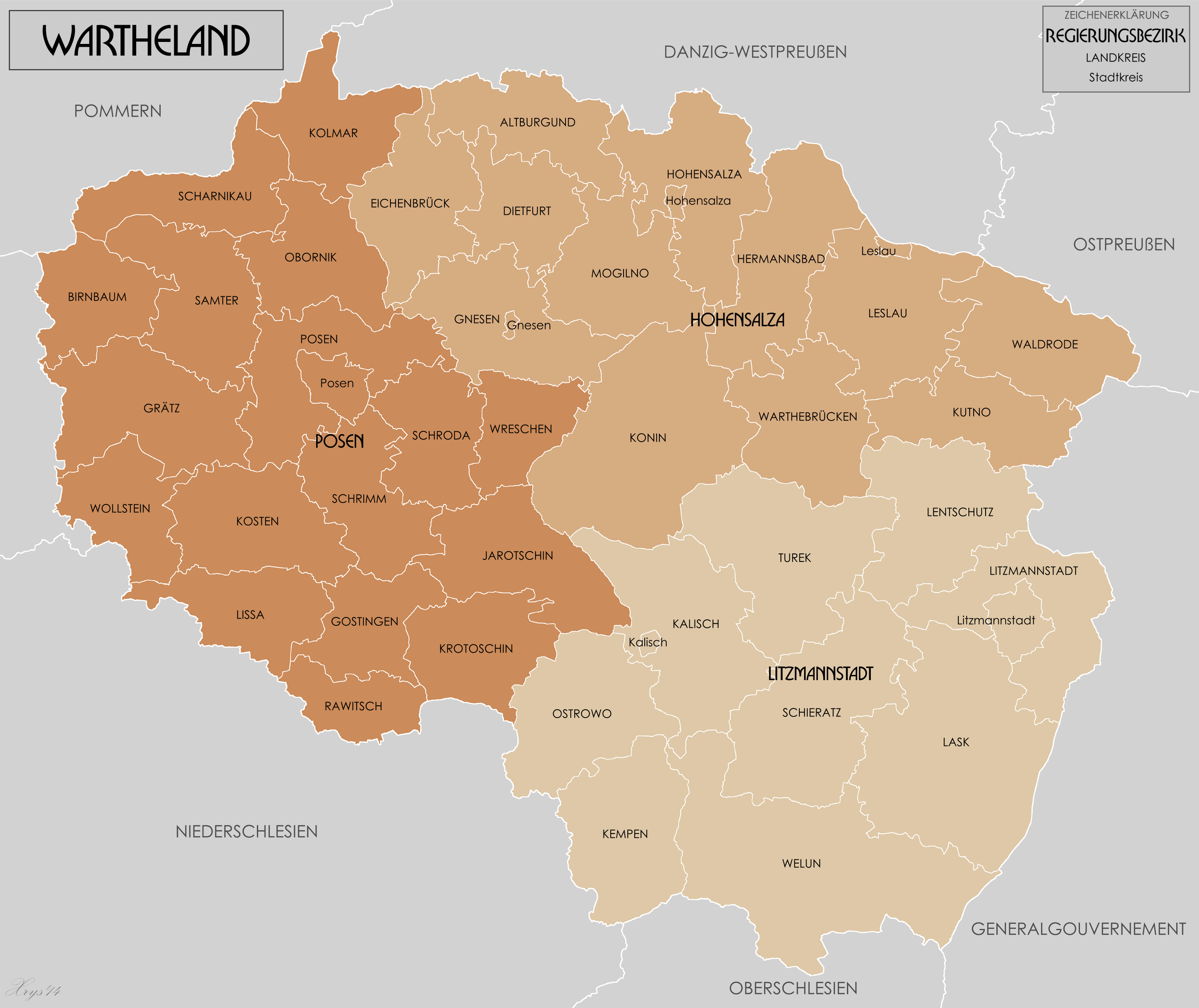 Verwaltungskarte des Reichsgau Wartheland im 1944. Datei digitalisiert aus der Karte von Mitteleuropa 1:300m. Quelle einigen Karten WIG (